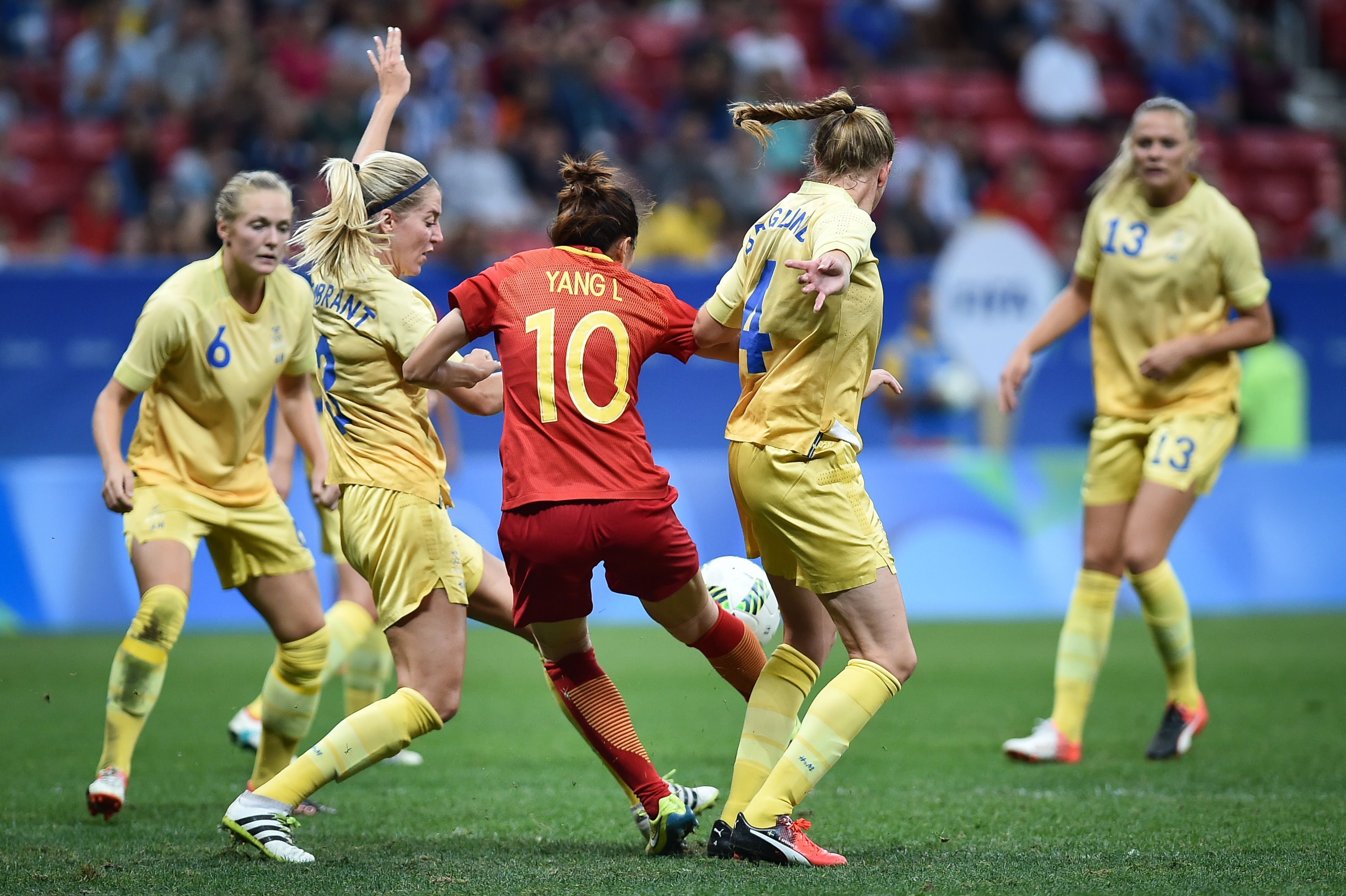 Estádio Nacional de Brasília Mané Garrincha, Brasília, DF, Brasil, 9/8/2016 Foto: Andre Borges/Agência Brasília China e Suécia jogam nesta terça-feira (9), no Estádio Mané Garrincha, pelo grupo E do futebol feminino na Olimpíada 2016.